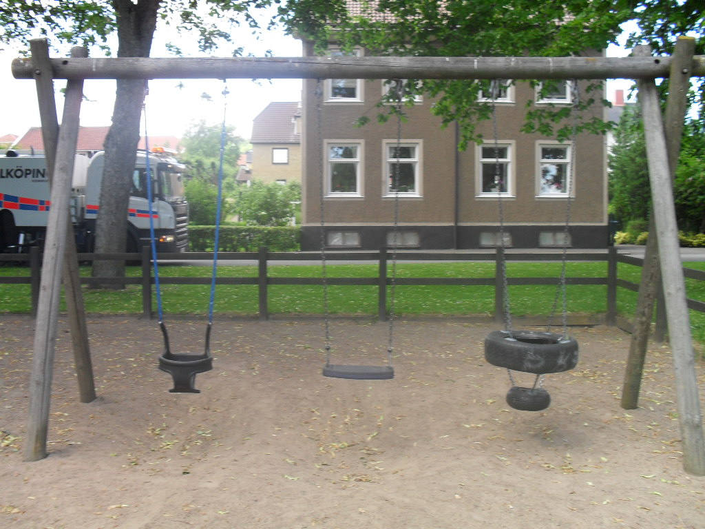 3 st gungor